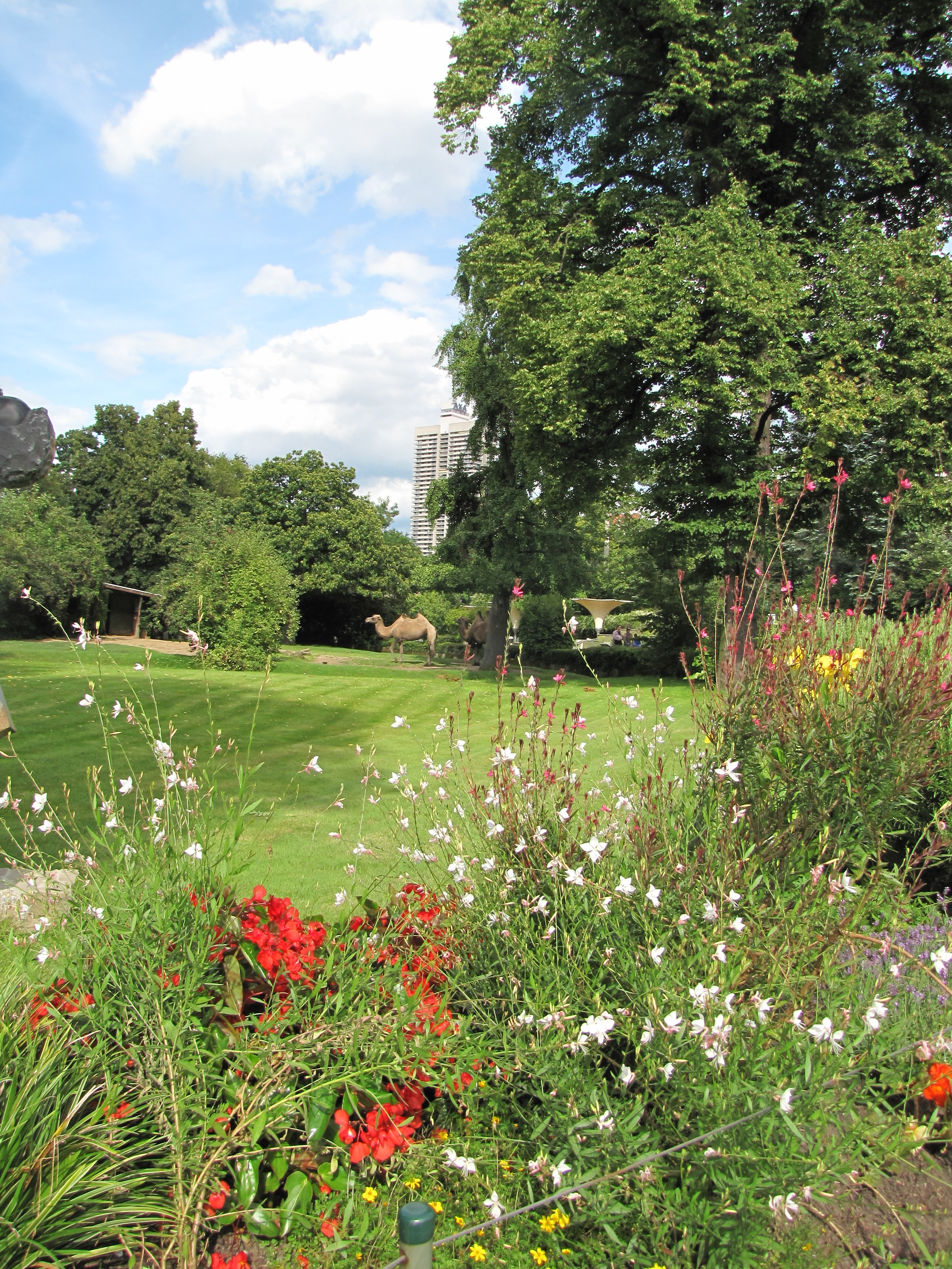 Parkanlage des Kölner Zoos mit Trampeltier (Camelus ferus bactrianus). Der früher "Kamelpark" genannte Bereich befindet sich seit 1936 am Zooeingang. Anlage eingerichtet von Zoodirektor Hauchecorne